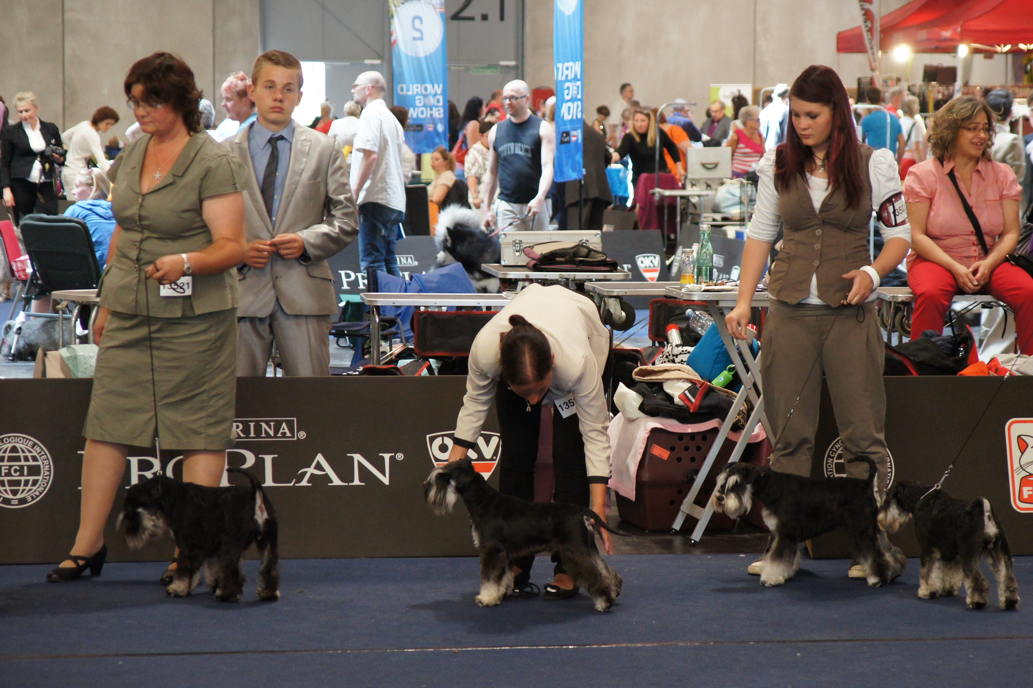 Участники Всемирного Дог Шоу в Зальцбурге (Австрия)